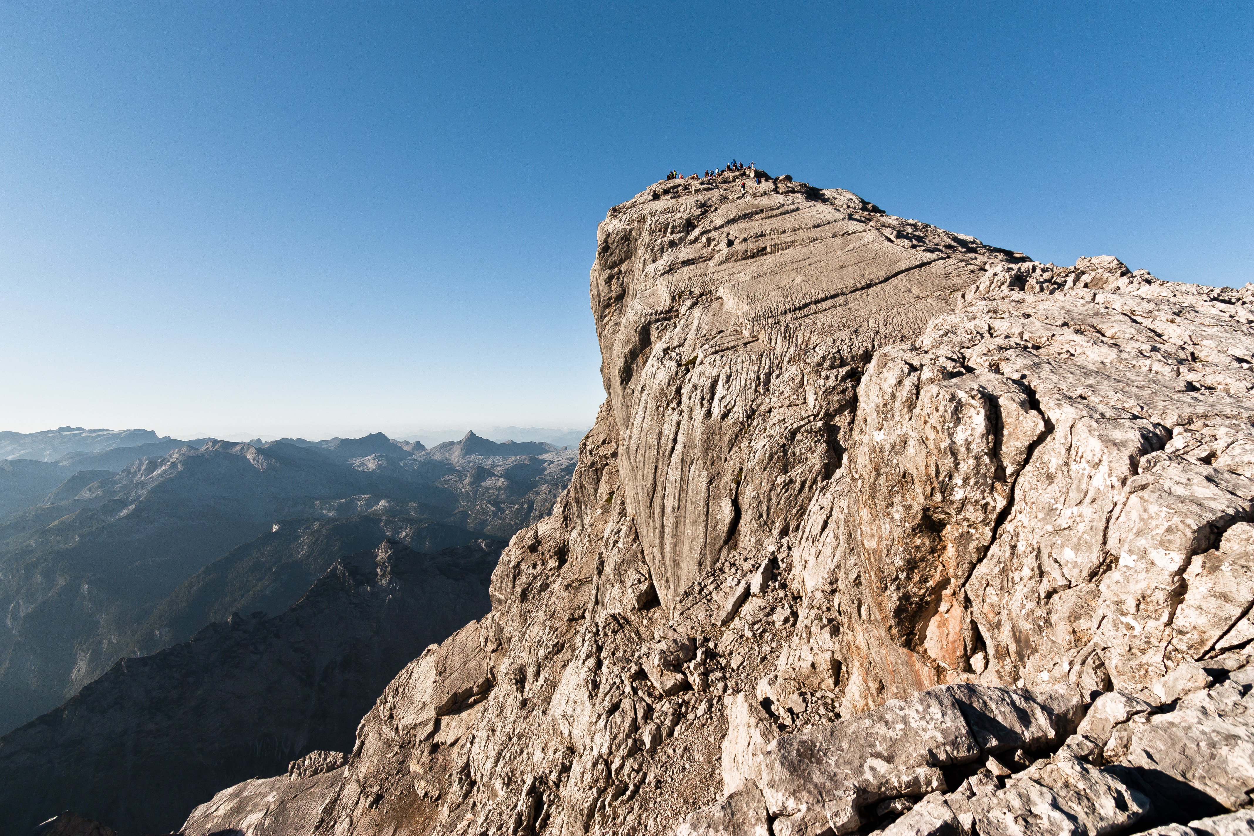 Blick auf das Watzmann Hocheck vom Watzmanngrat aus